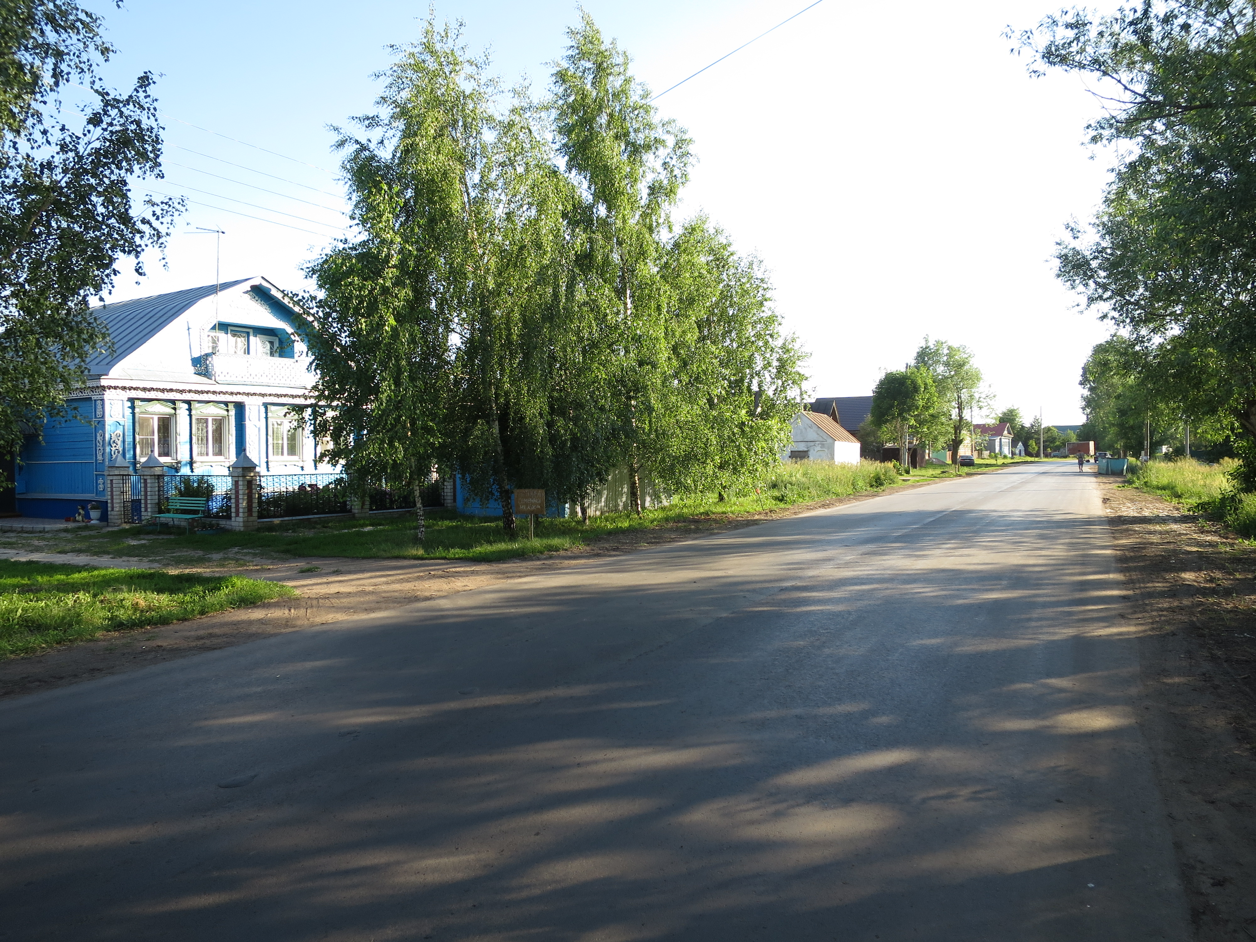 Арзамасский район, Мерлино